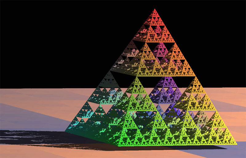 En Sierpinskipyramid är en utveckling av fraktalen Sierpinskitriangel. Bilden har skapats med ett itererande funktionssystem, ("slumpvandringsmetoden"), i tre dimensioner där pyramidens fem hörn är attraktorerna. Renderingstekniken bygger på två stycken Z-tabeller. Den ena beskriver avståndet till dom punkter som syns i bild, (betraktarens vy) och den andra avståndet till dom punkter som är belysta av ljuskällan (dom punkter som "syns" från ljuskällans "vy"). Om en ny punkt under renderingen skulle hamna närmare betraktaren/ljuskällan än den punkt som tidigare fanns på samma plats i respektive tabell så kommer den att ta den tidigare punktens plats, annars inte. Dom punkter som finns i betraktarens vy men inte i ljuskällans kommer att befinna sig i skugga, (reducerad luminicens). Tekniken brukar, på engelska, kallas "Light-source". Andra bilder i samma serie: Linjära fraktaler i 3D: Bild:Sierpinskitetraed.jpg|right|thumb|Sierpinskitetraed Bild:Cantorkub (Fraktal).jpg|right|thumb|Cantorkub Bild:Mengers tvättsvamp (Fraktal).jpg|right|thumb|Mengers tvättsvamp Kategori:Bilder av fraktaler